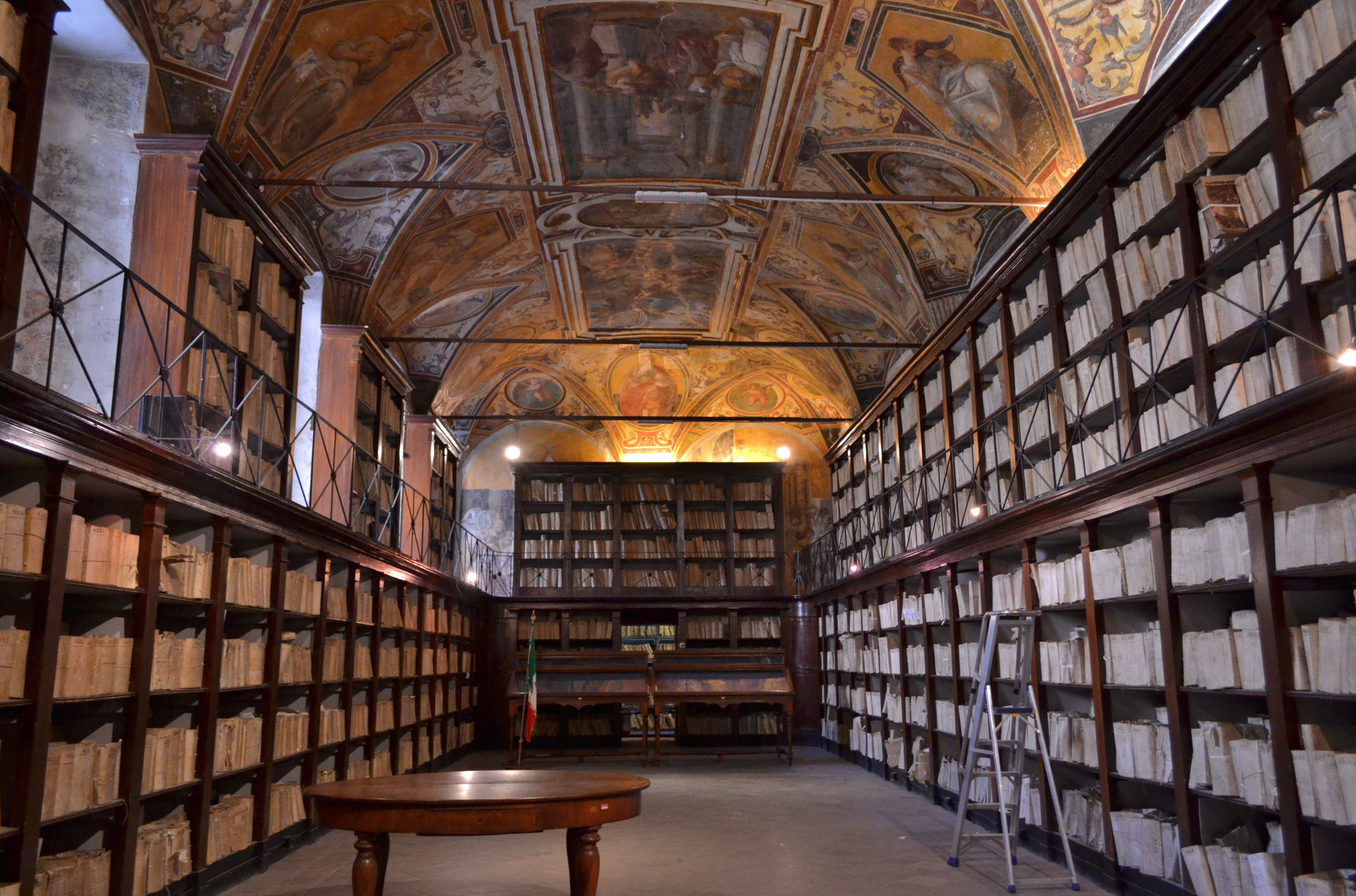 Convento dei Santi Severino e Sossio (Napoli) - Sala del Capitolo (sede dell'Archivio di Stato di Napoli)